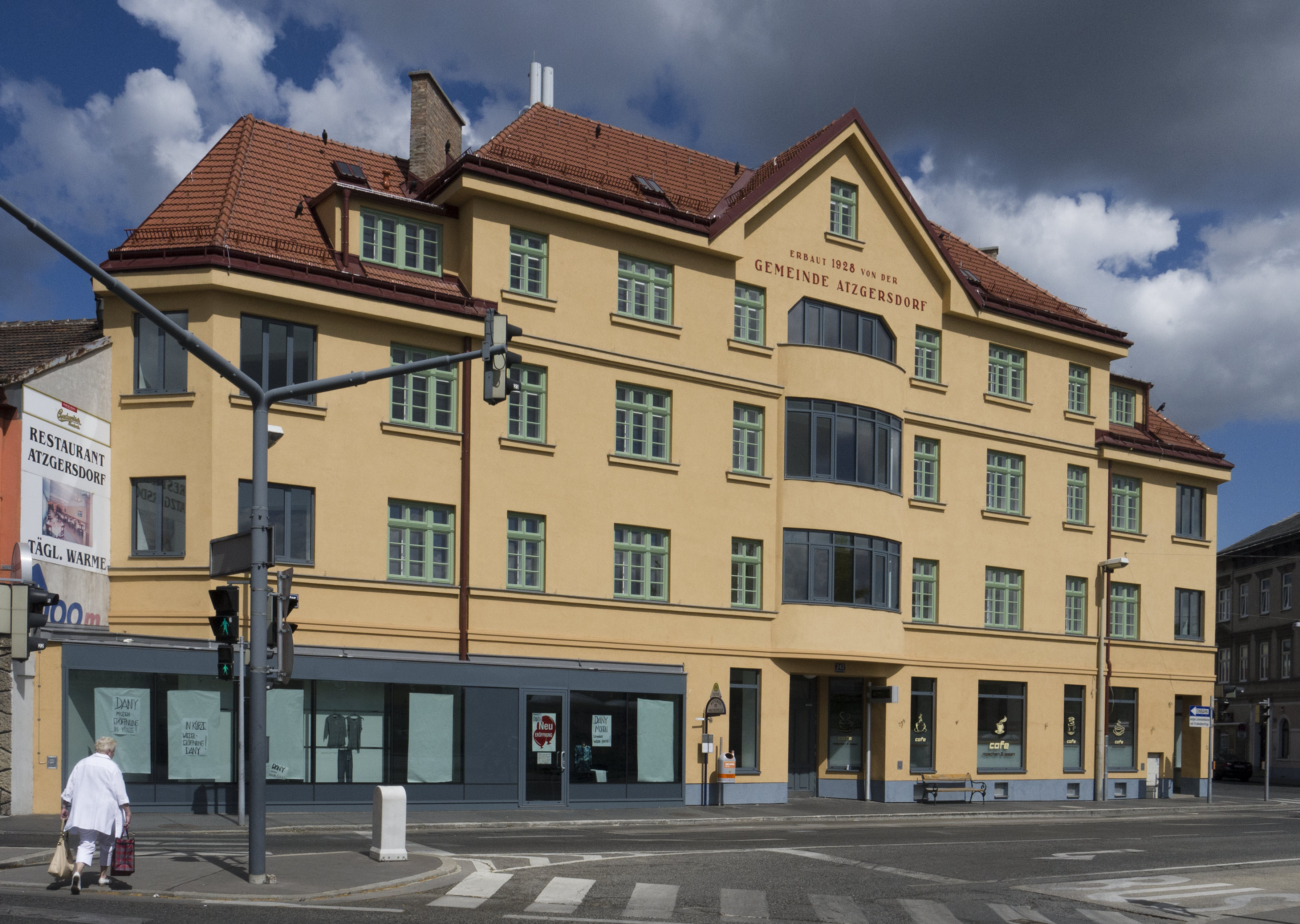 Kommunaler Wohnbau